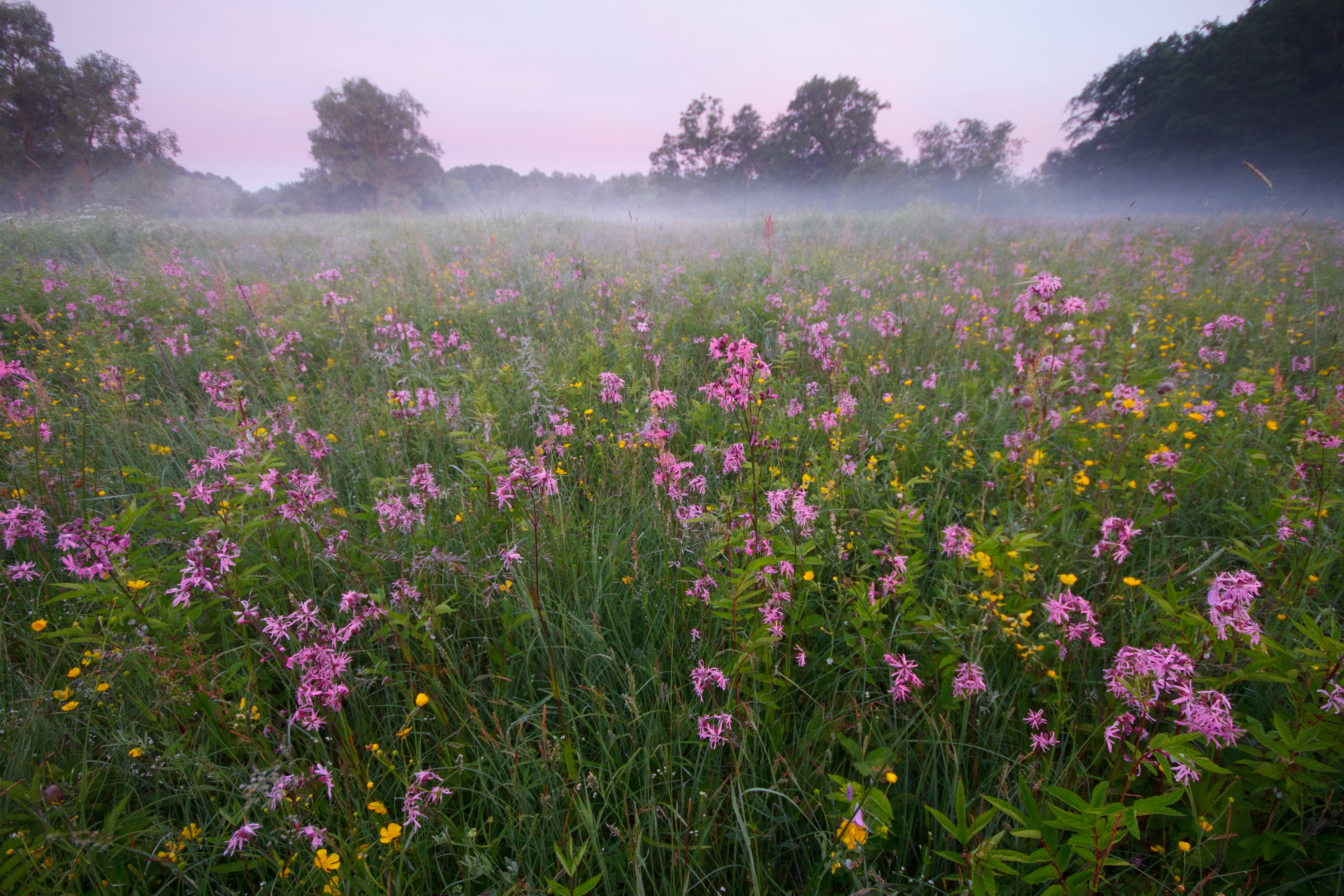 Soomaa luhad. Juunikuine varahommik luhal.